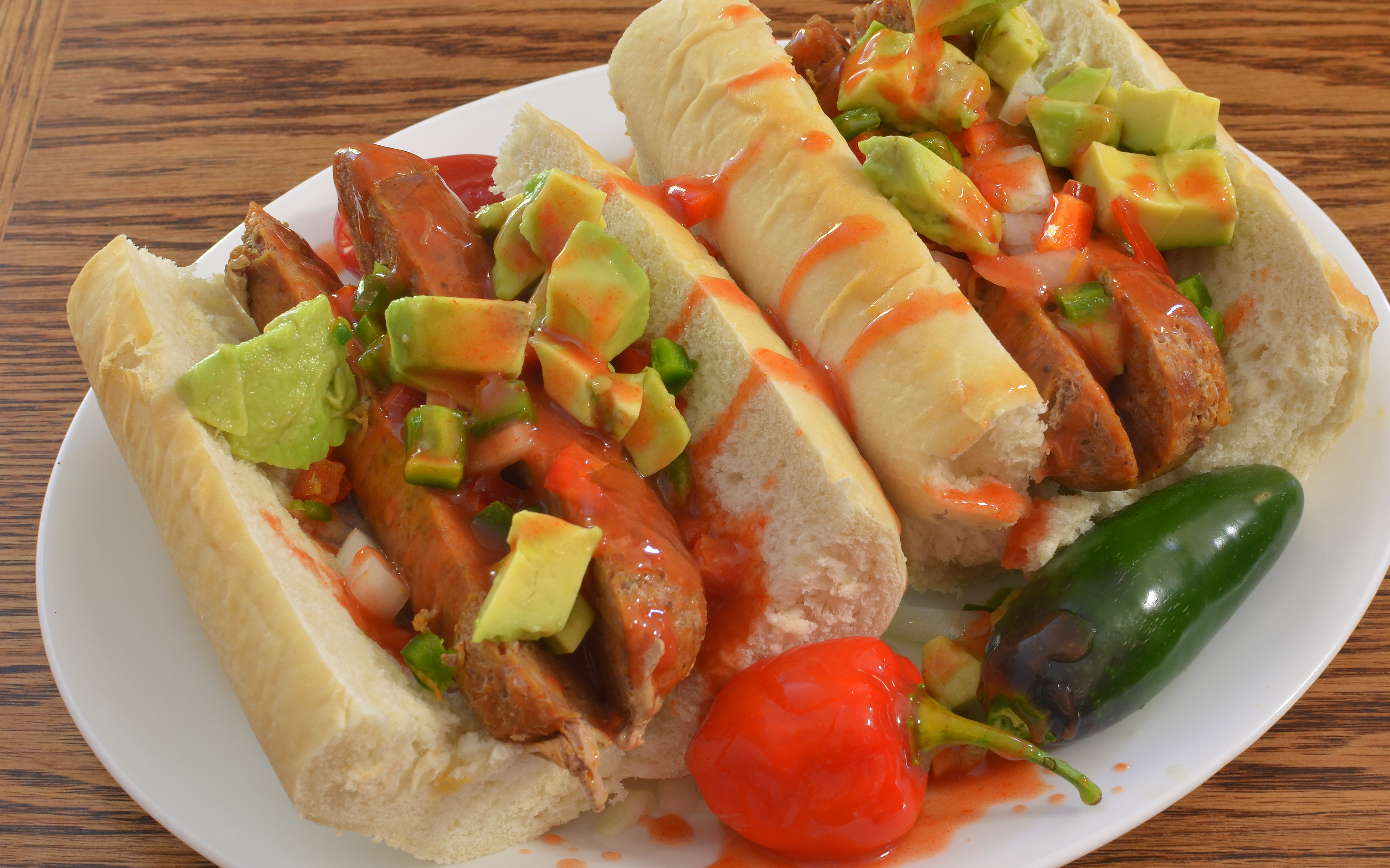 Hot chorizo links